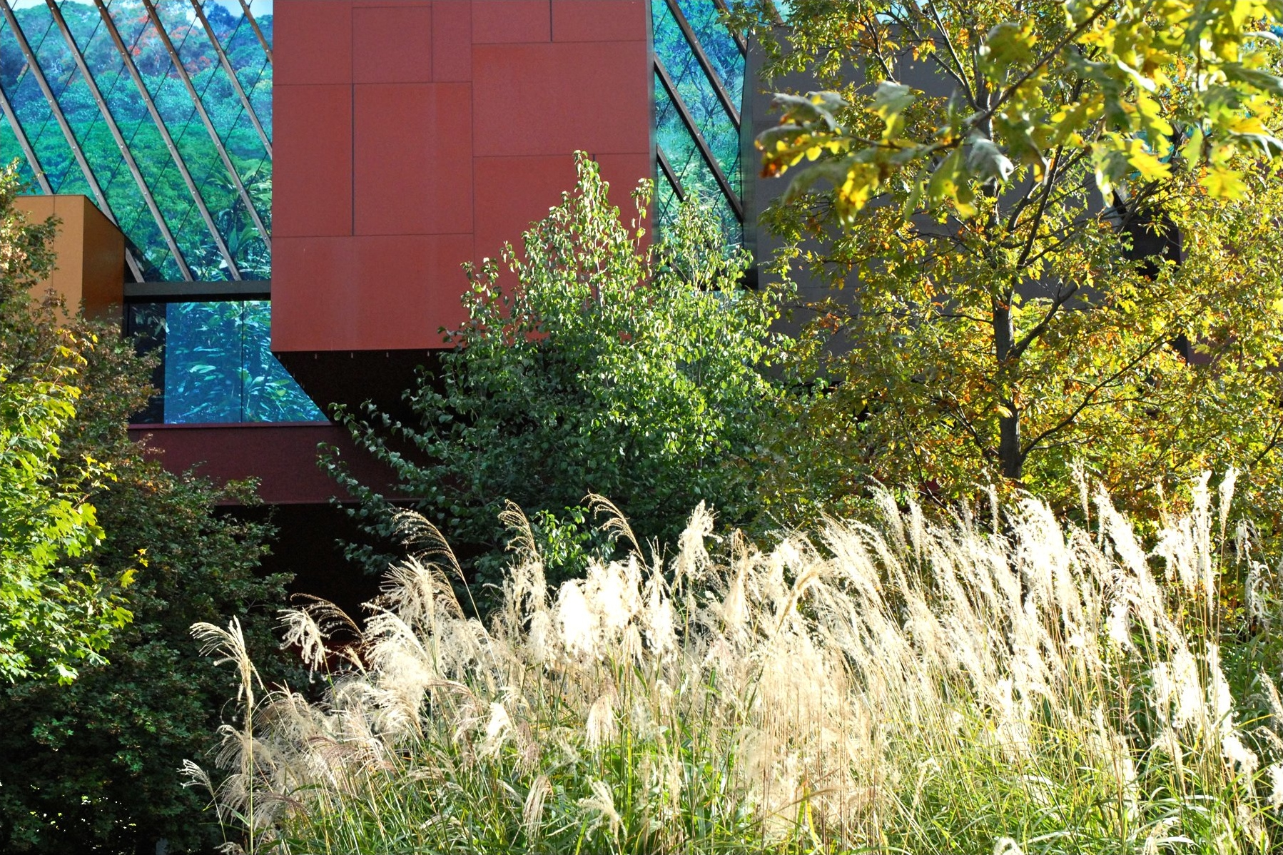 Le jardin du musée du quai Branly en automne Le bâtiment du musée du quai Branly a été conçu par l’architecte Jean Nouvel. Il se compose de quatre bâtiments reliés par des passerelles et disposés sur un terrain de 39 000m². Epousant la courbure douce de la Seine au pied de la tour Eiffel, il est juché sur pilotis et niché dans la verdure. Dessiné par Gilles Clément, le jardin fait partie intégrante du musée : jardin buissonnant, il s’étend sur 18000 m² et donne au visiteur une impression de foisonnement. site du musée